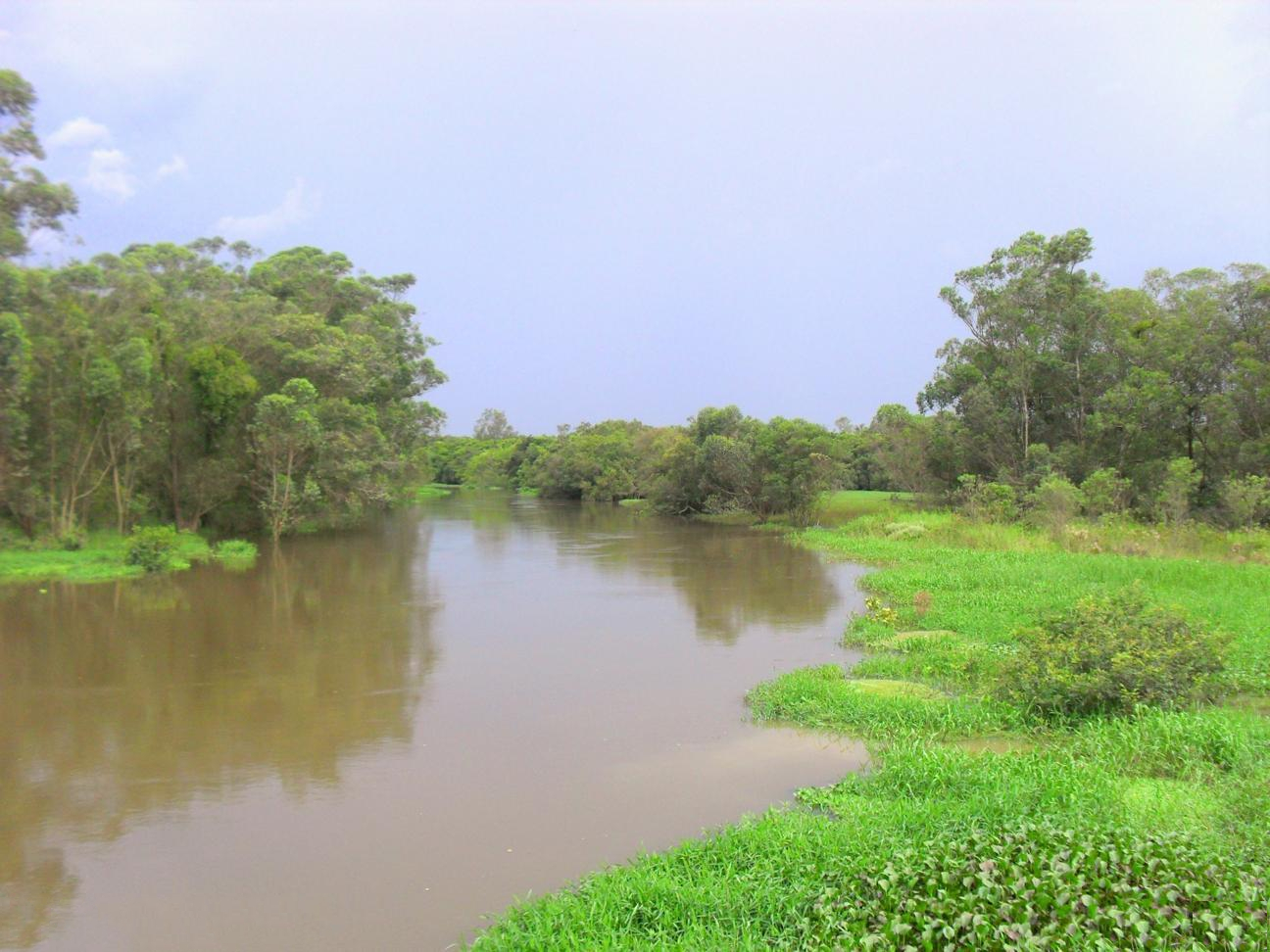 Rio Tietê e Suzano